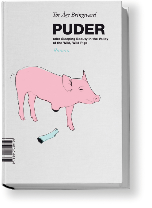 „PUDER“ von Tor Åge Bringsværd, 2008 in deutscher Übersetzung erschienen bei ONKEL & ONKEL (Umschlagabbildung)